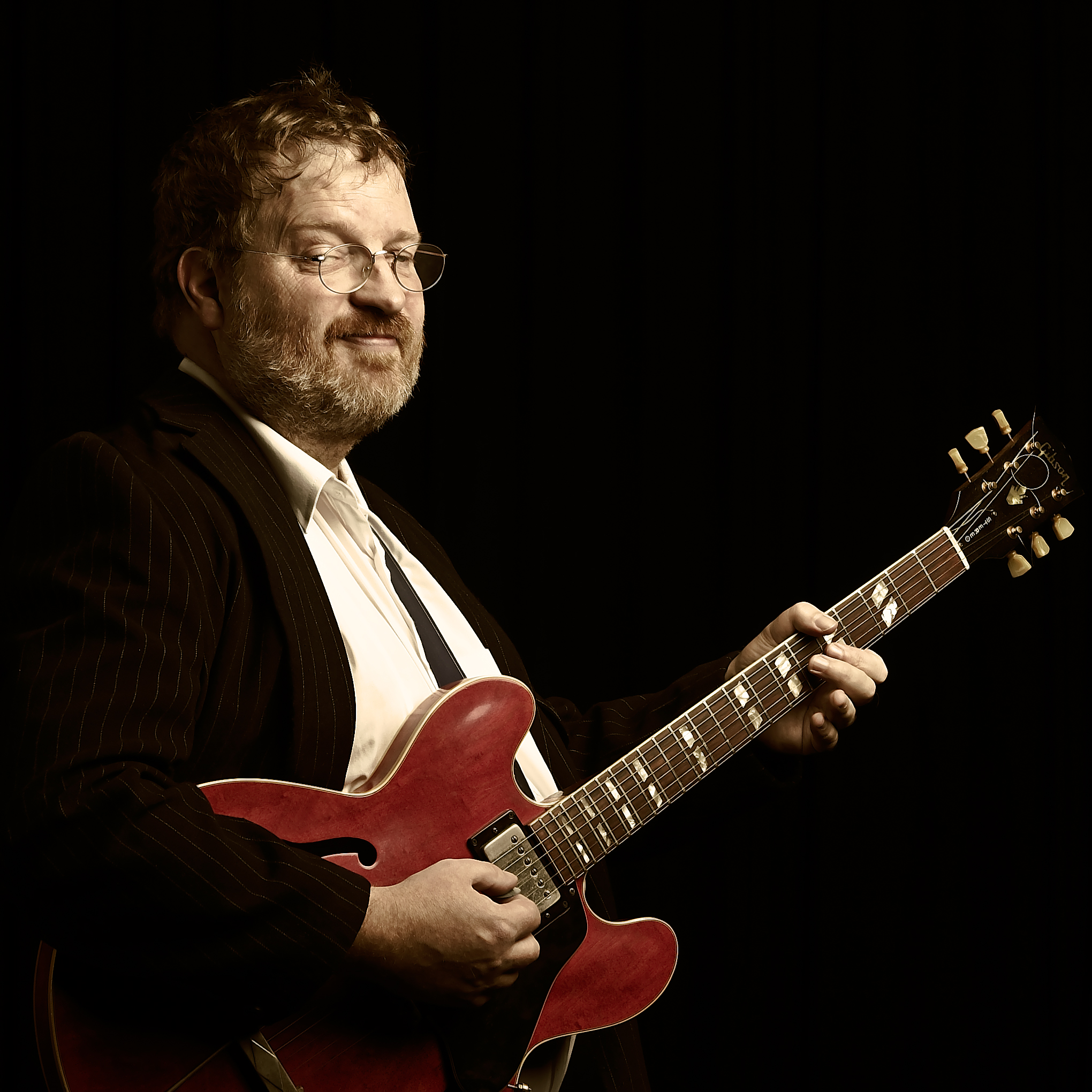 Design and photography by Jan Karow